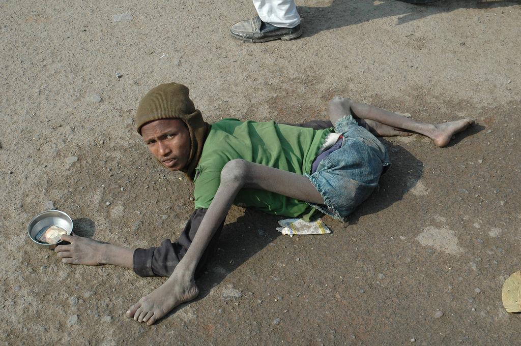 A beggar in Bodhgaya in IndiaBeggar in Bodhgaya India